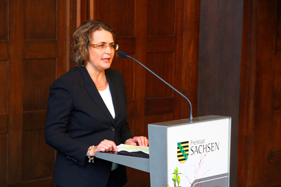 Susanne Lenz-Gleißner bei ihrer Auszeichnung mit dem Dietrich-Oppenberg-Medienpreis in der Sächsischen Staatskanzlei Dresden